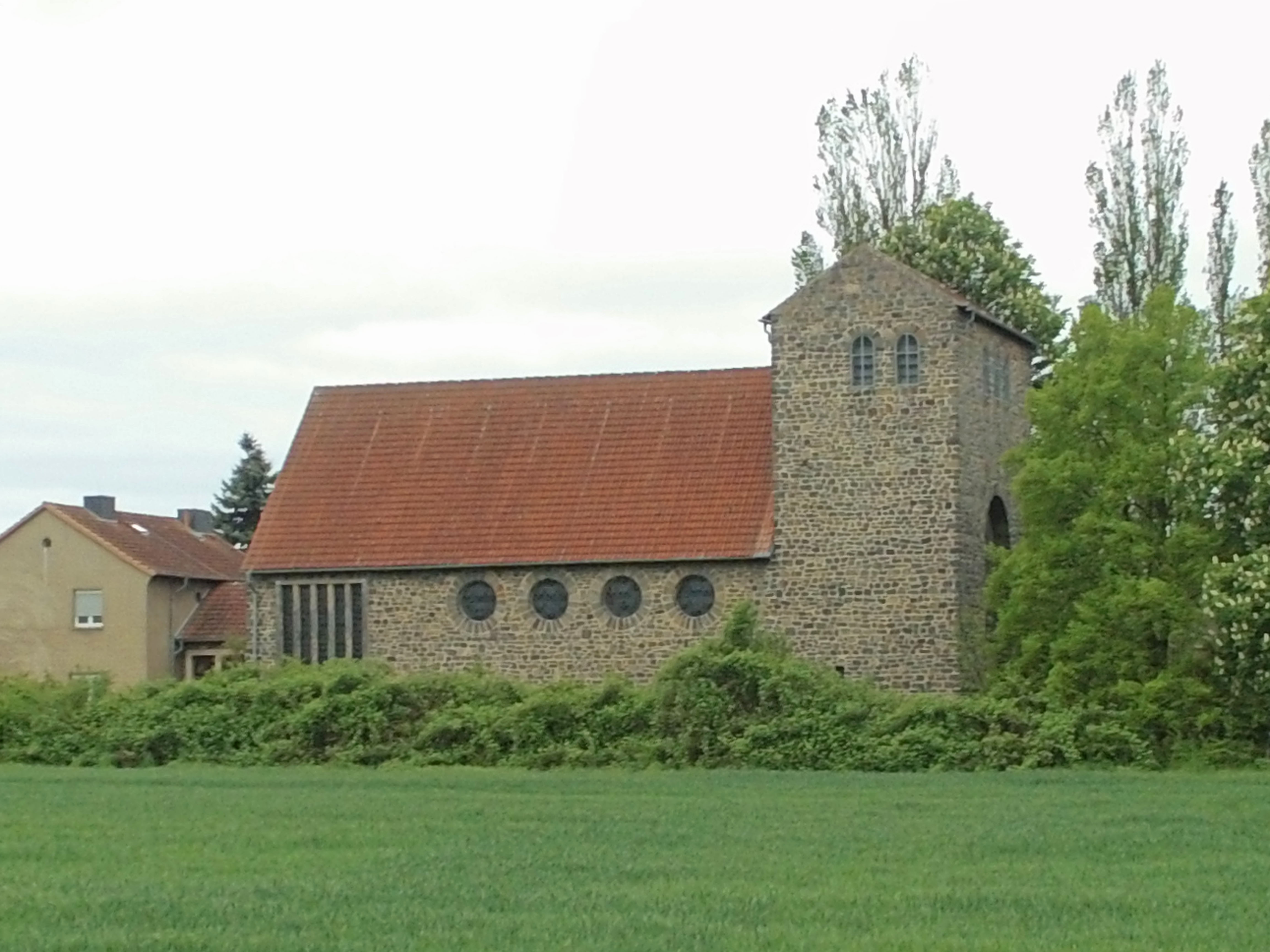 Römisch-katholische Heilig-Kreuz-Kirche in Bismark (Altmark)